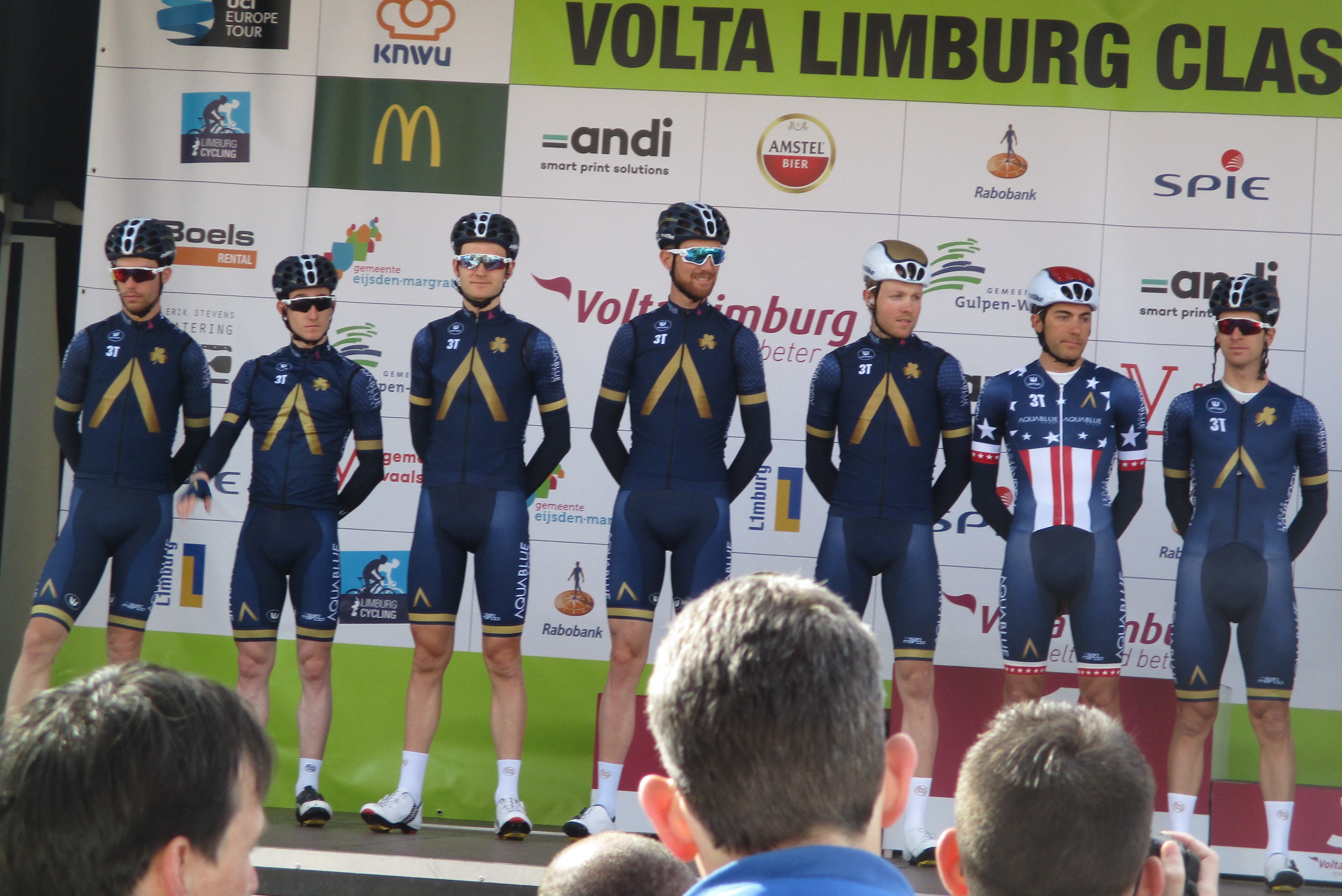 Start van de Volta Limburg Classic 2018 in de Diepstraat in Eijsden